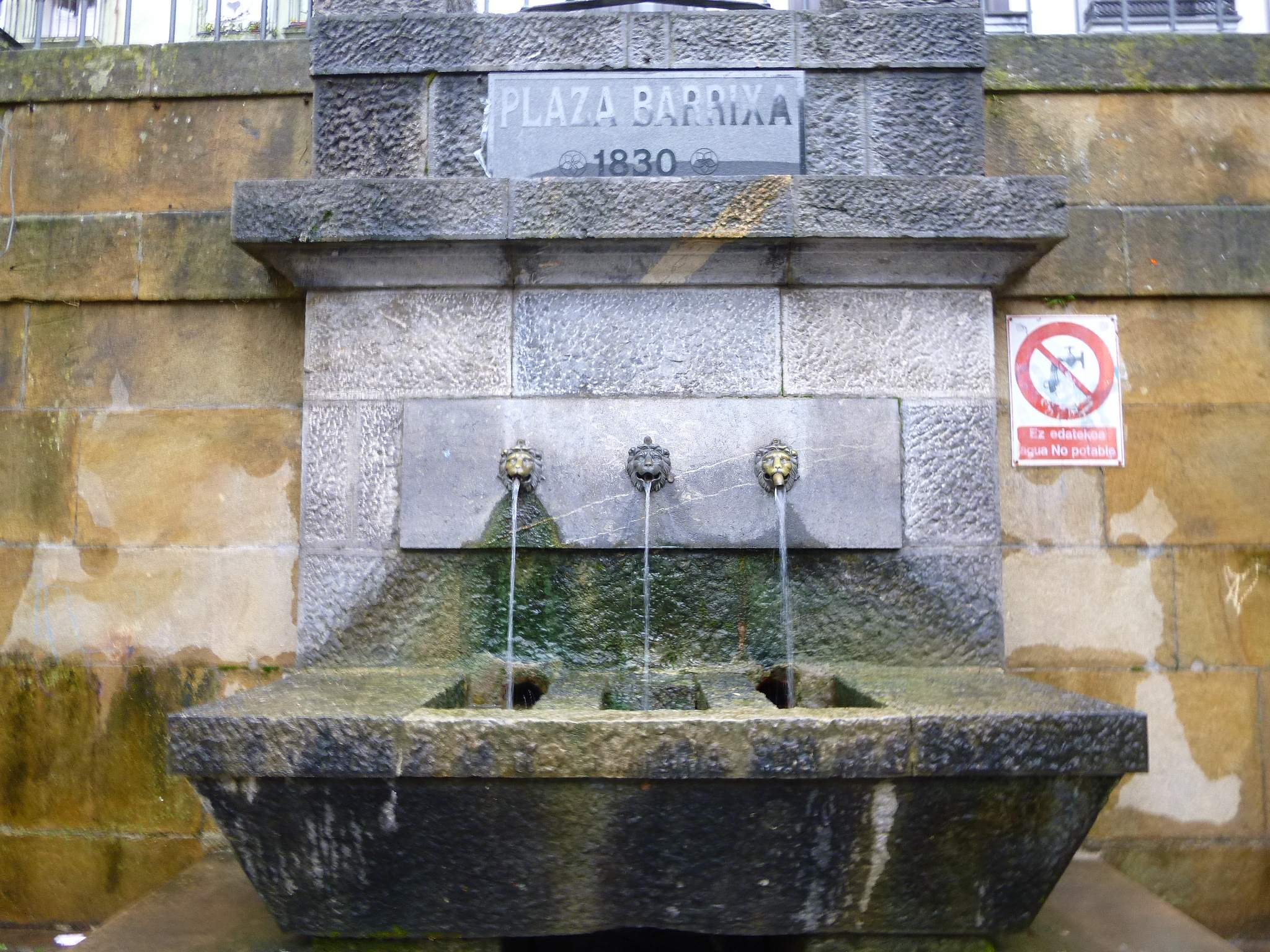 Soraluze (Gipúzkoa)